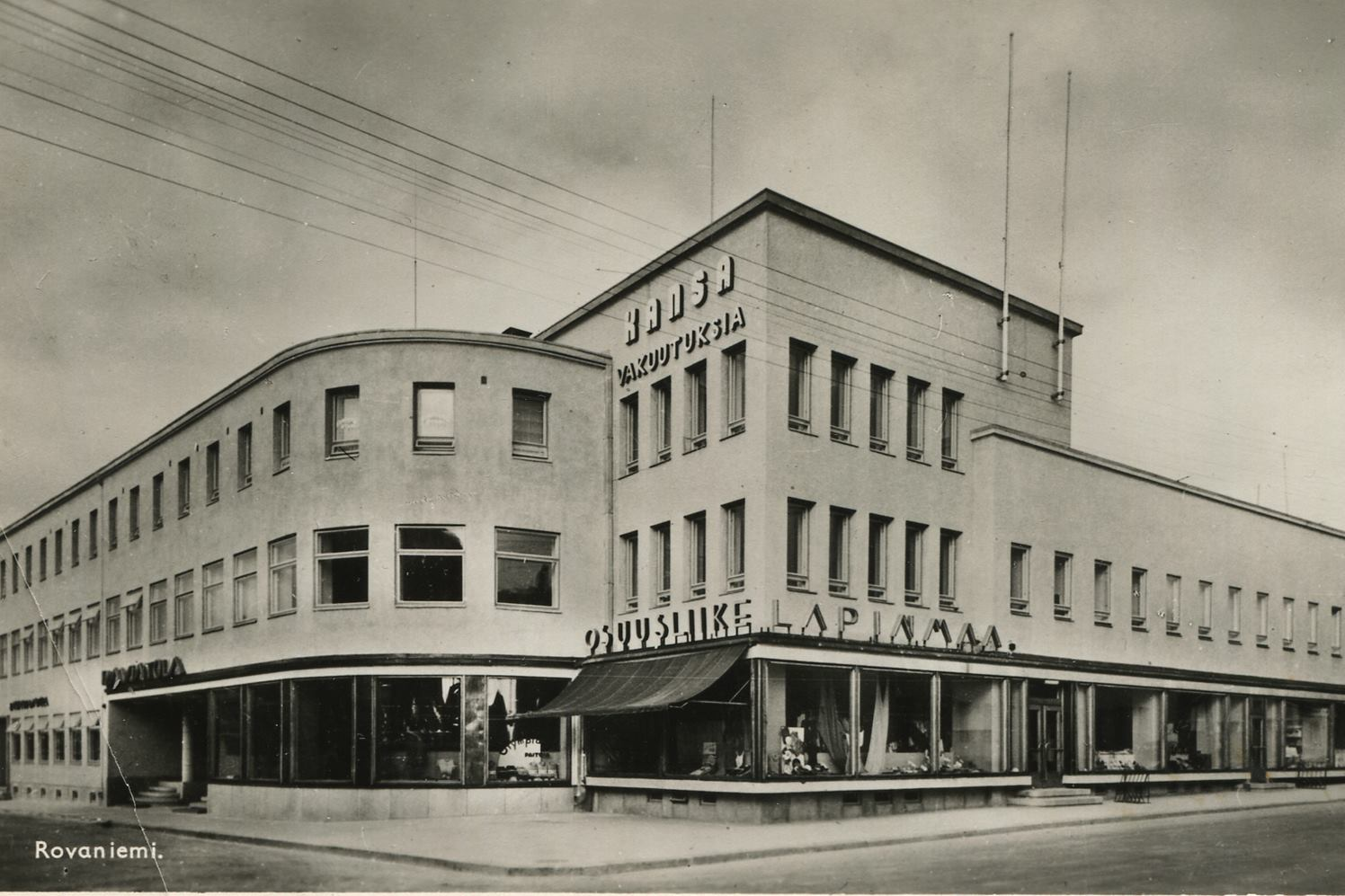 Osuusliike Lapinmaa Rovaniemellä